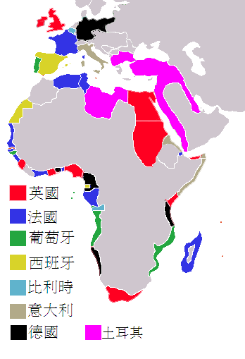 1885年非洲殖民